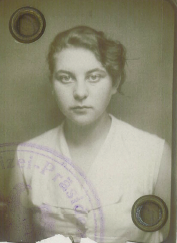 Photographie de passeport de Marta Hillers